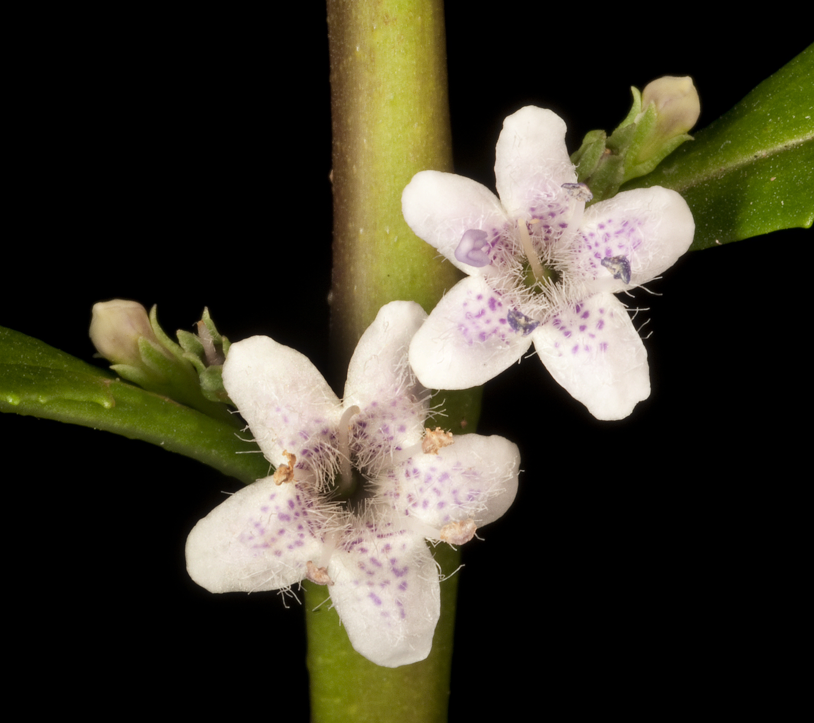 KRT4398